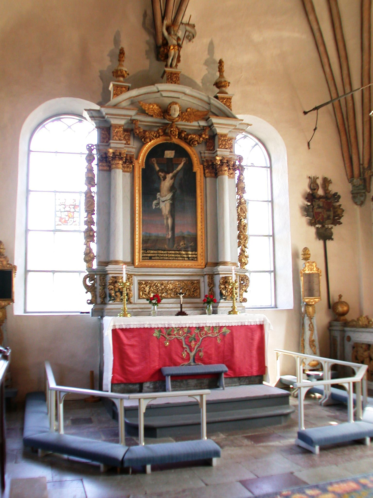 The altar, Björklinge church, Uppsala, Sweden